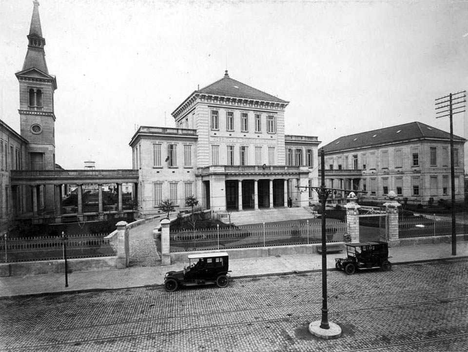 Fachada del antiguo Hospital Carlos Durand, en el barrio de Caballito (Buenos Aires). Inaugurado en 1913, fue ampliado en 1941 y totalmente remodelado en 1979.